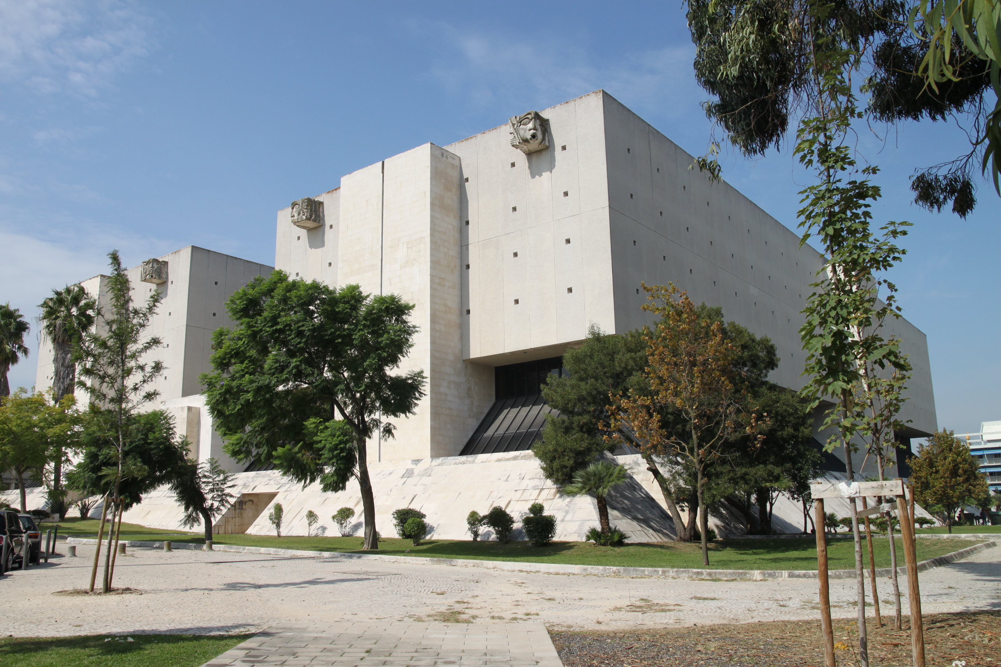 Torre do Tombo This file was uploaded for Wiki Loves Monuments in Portugal with the unique identifier 97014262.